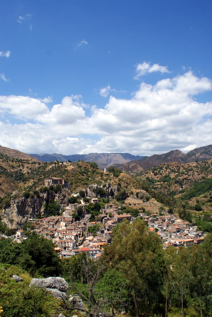 Palizzi superiore